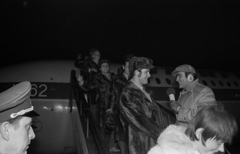 Berlin, Rückkehr DDR-Olympiamannschaft ADN-ZB Mittelstädt-17.2.72 Berlin: Die erste souveräne DDR-Olympiamannschaft wieder in der Heimat. Ein begeisterter Empfang wurde der erfolgreichen Olympia-Mannschaft der DDR bei ihrer Rückkehr von den XI. Olympischen Winterspielen in Sapporo in die Heimat am Abend des 16.2.72 auf dem Zentralflughafen Berlin-Schönefeld bereitet. Fernsehreporter Heinz-Florian Oertel (r) beim ersten Interview mit dem Goldmedaillengewinner in der Nordischen Kombination, Ulrich Wehling. Dahinter auf der Gangway Mannschaftsleiter Manfred Ewald (verdeckt), Rainer Bredow (Goldmedaillengewinner im Rennschlittensport, Doppelsitzer) und Dr. Heinz Schöbel, Präsident des NOK der DDR und Mitglied des IOC. Abgebildete Personen: Oertel, Heinz Florian: Rundfunkreporter, DDR (GND 118736043) Wehling, Ulrich: Skisportler, Nordische Kombination, SC Traktor Oberwiesenthal, Olympiateilnehmer 1972, 1976 und 1980, DDR